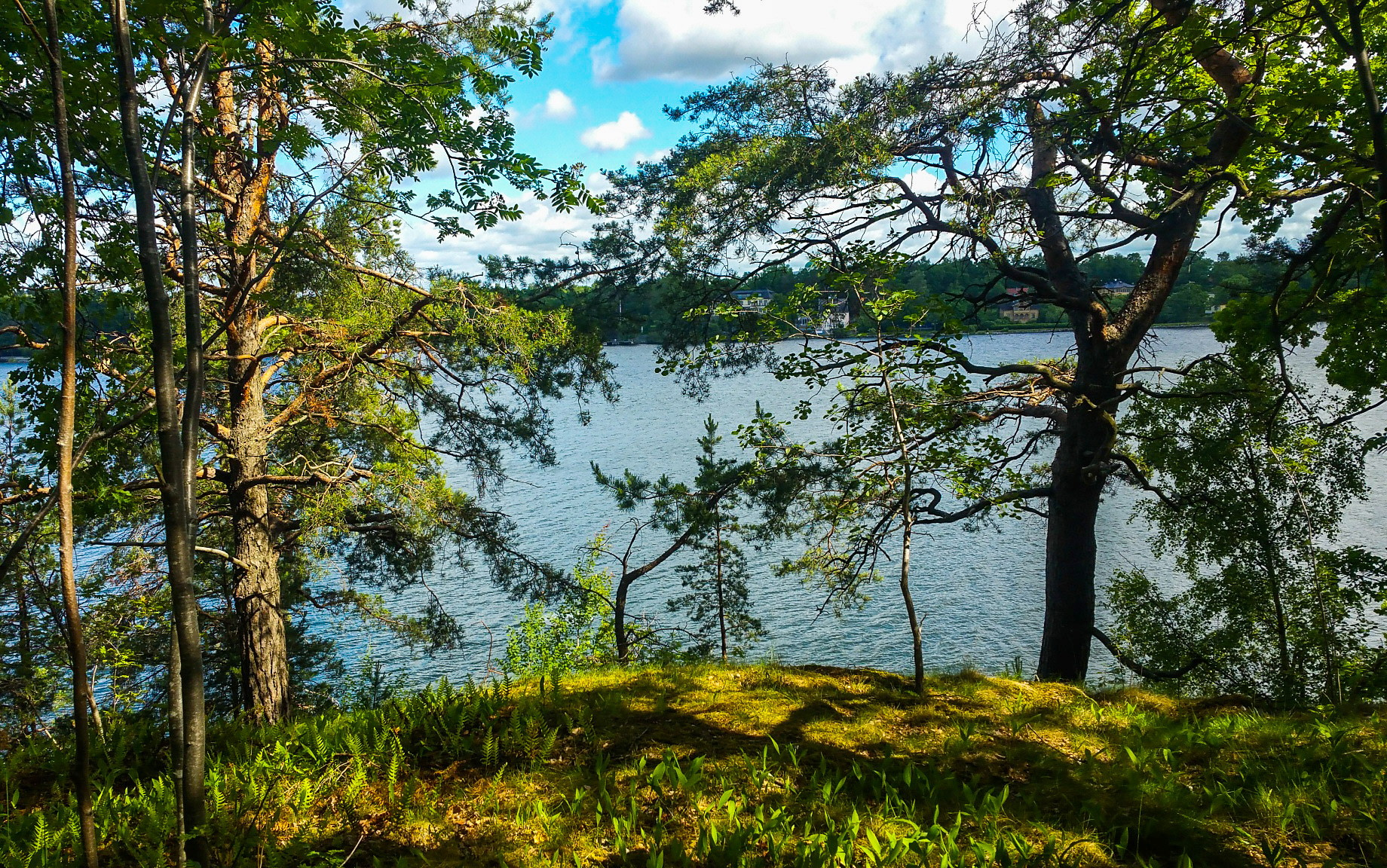 Utsikt bland tallarna från Fredriksberg på Kvarnholmen i Nacka